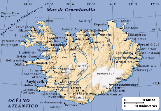 Descripción: Mapa de Islandia. Estatus de copyright: Domino público. Enlaces relacionados: Geología de Islandia.